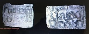 Prova material da referência, ainda no século XIX, ao Mosteiro de S. Pedro Fins de Ferreira, no atual concelho de Paços de Ferreira